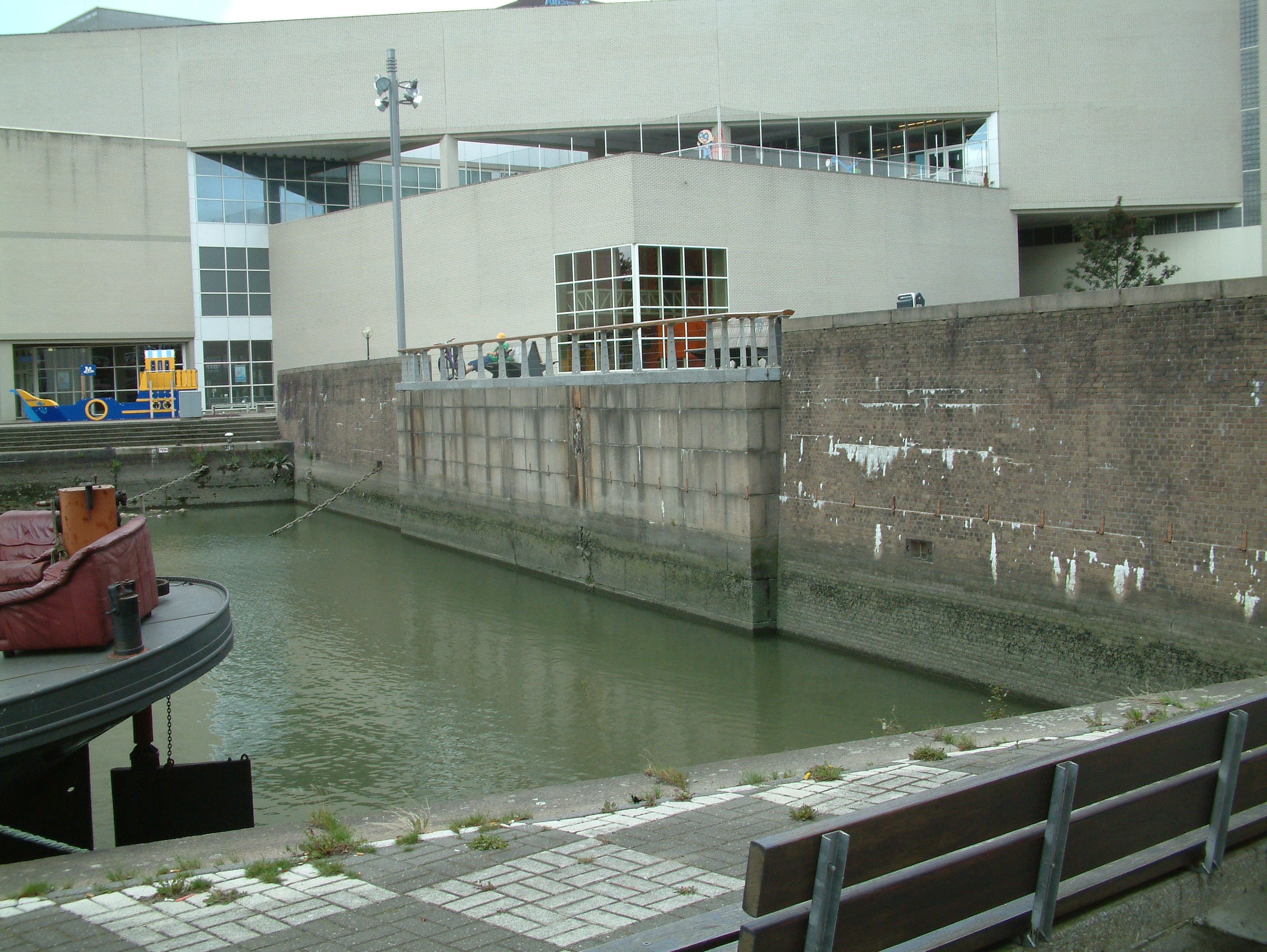 Bruggen over de Rotte, De afgesloten Leuvesluis, zuidkant